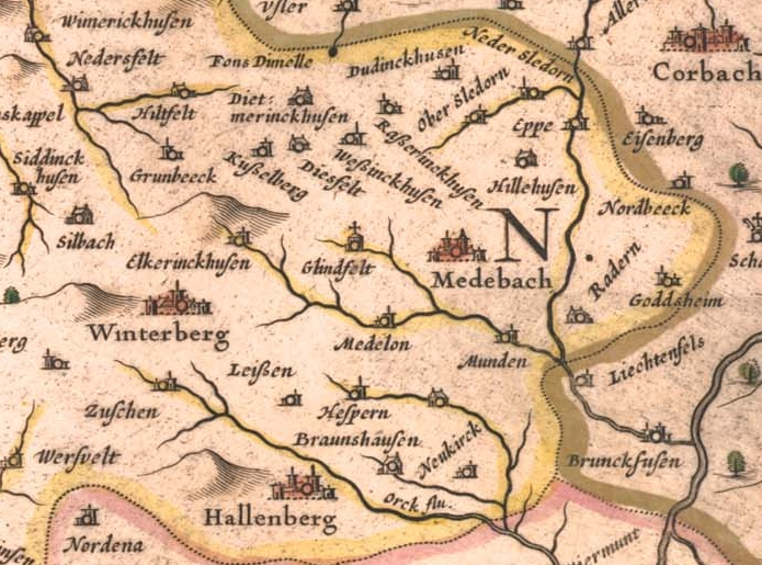 Karte Raum Hallenberg – Medebach - Winterberg, Auszug aus Blaeu 1645 - Westphalia Ducatus (Germany)